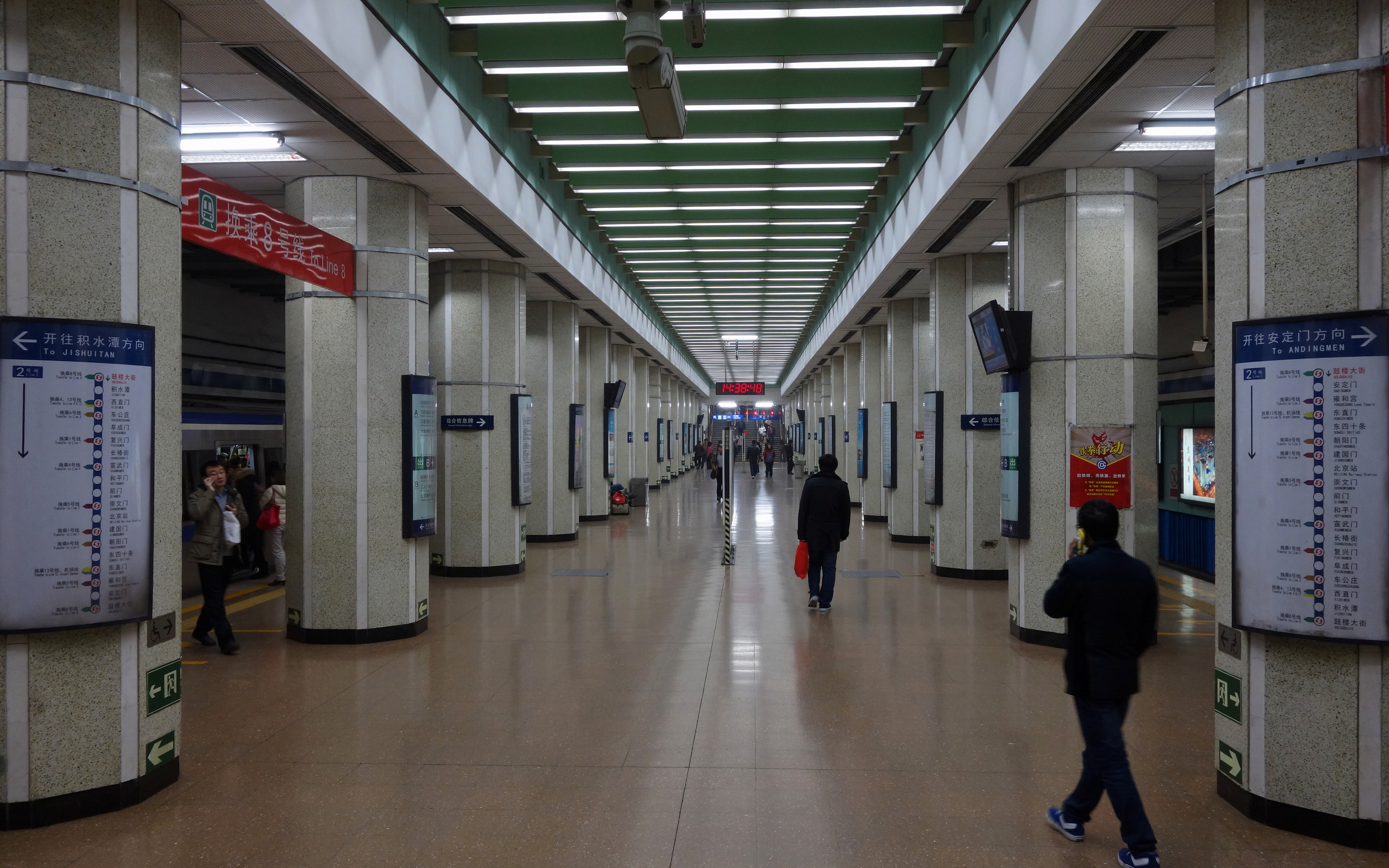 北京地铁2号线鼓楼大街站岛式站台